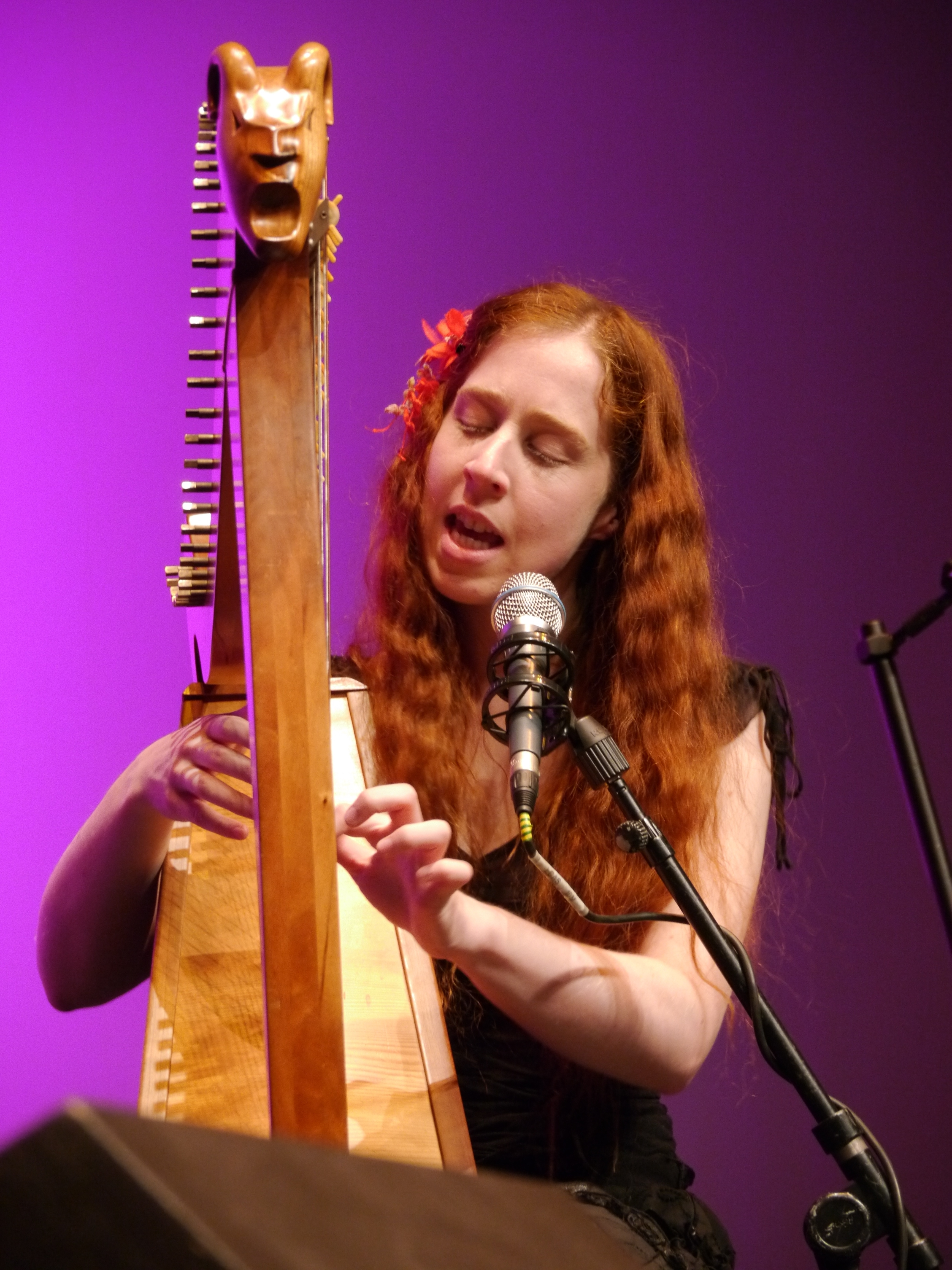 Mang'Azur 2011 - Concert Cécile Corbel - Samedi 16 avril - Palais Neptune - Toulon - P1090284.jpg